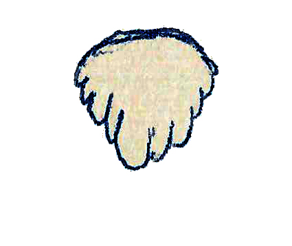 Illustration of a fossil of Alocodon